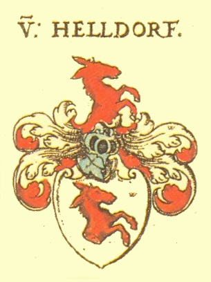 Wappen der Meißner Adelsfamilie Helldorf